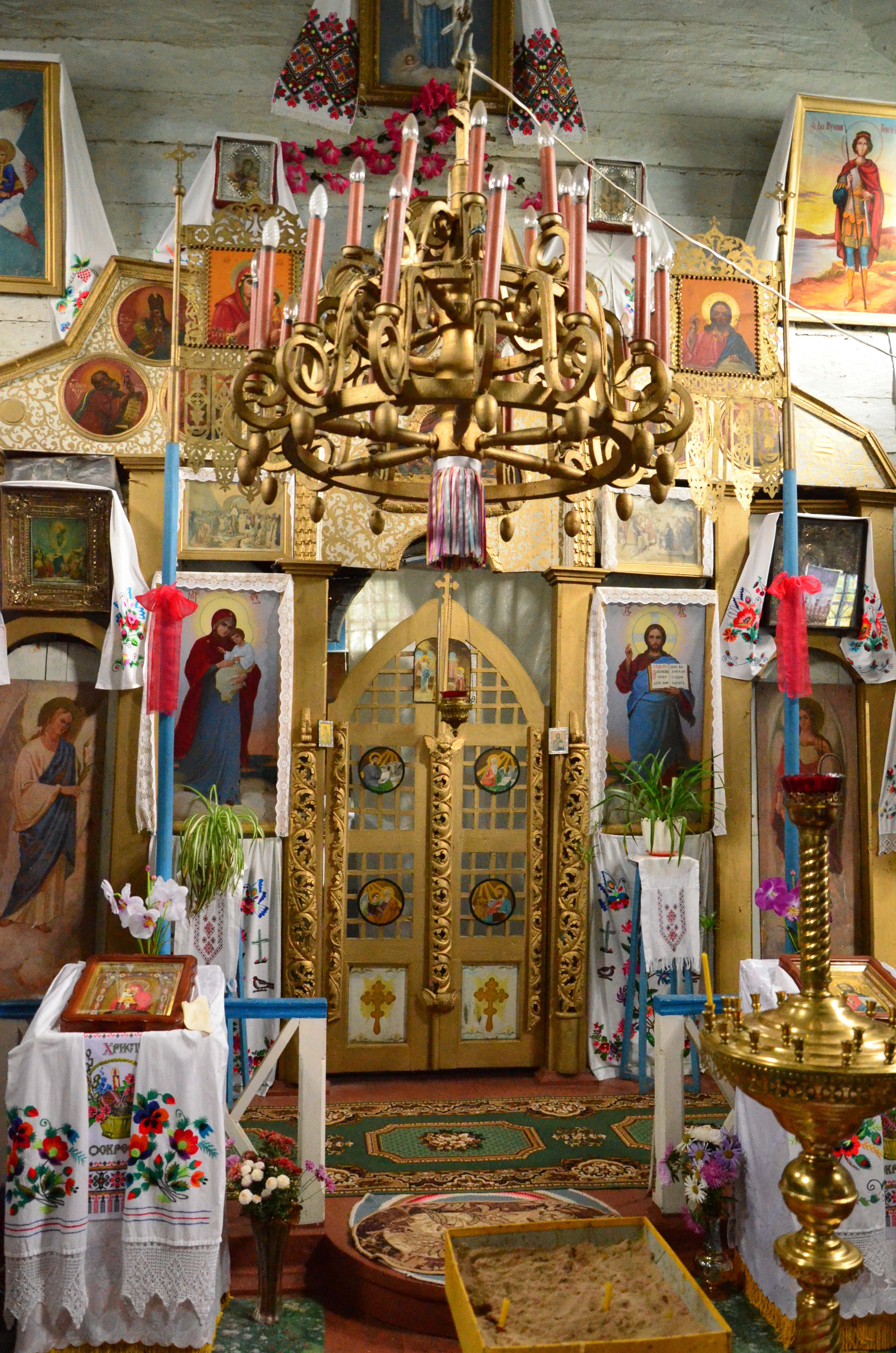 Миколаївська (Покровська) церква (дер.), смт Кожанка